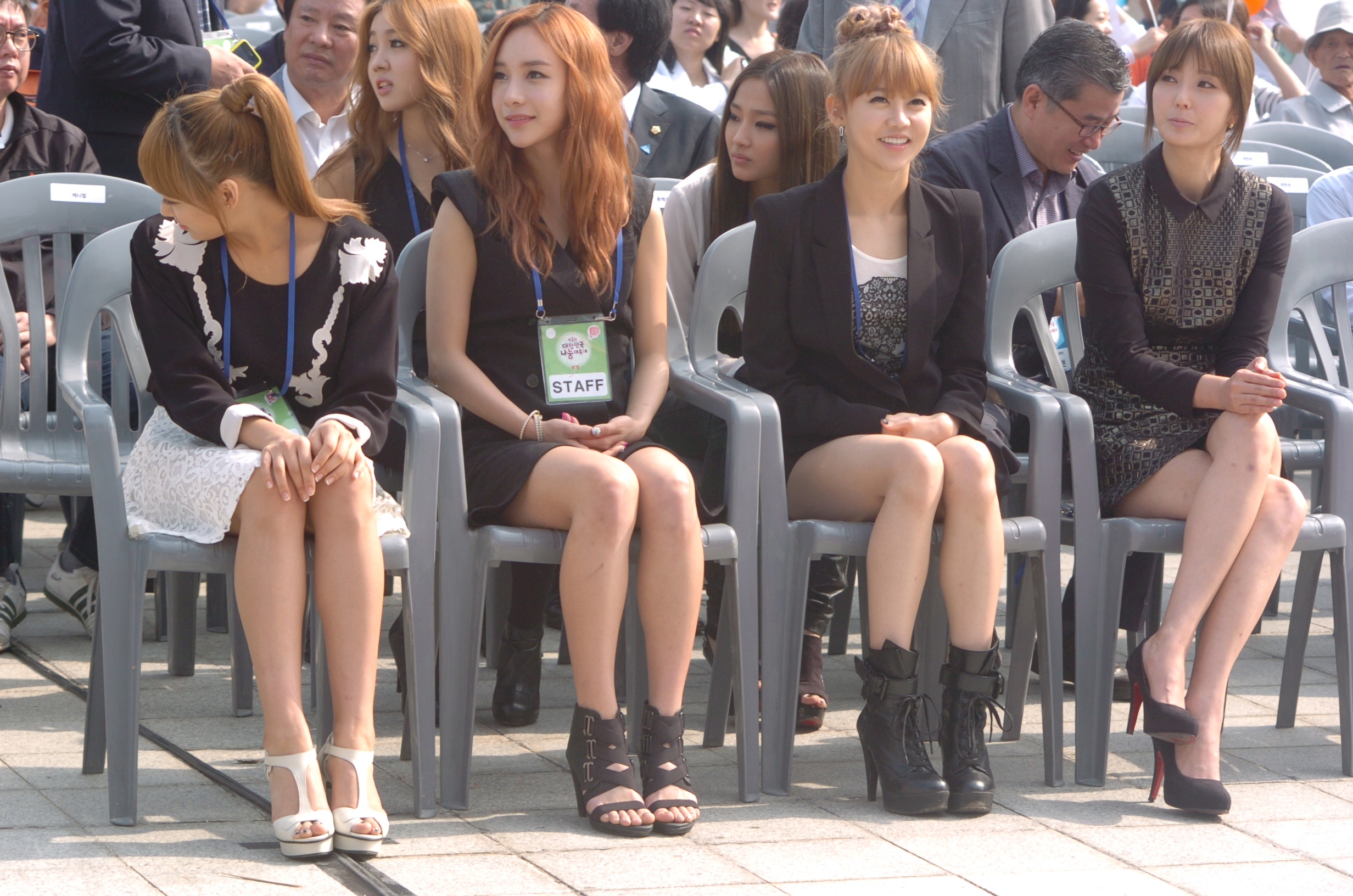 투엑스 (제3회대한민국나눔대축제,투엑스)